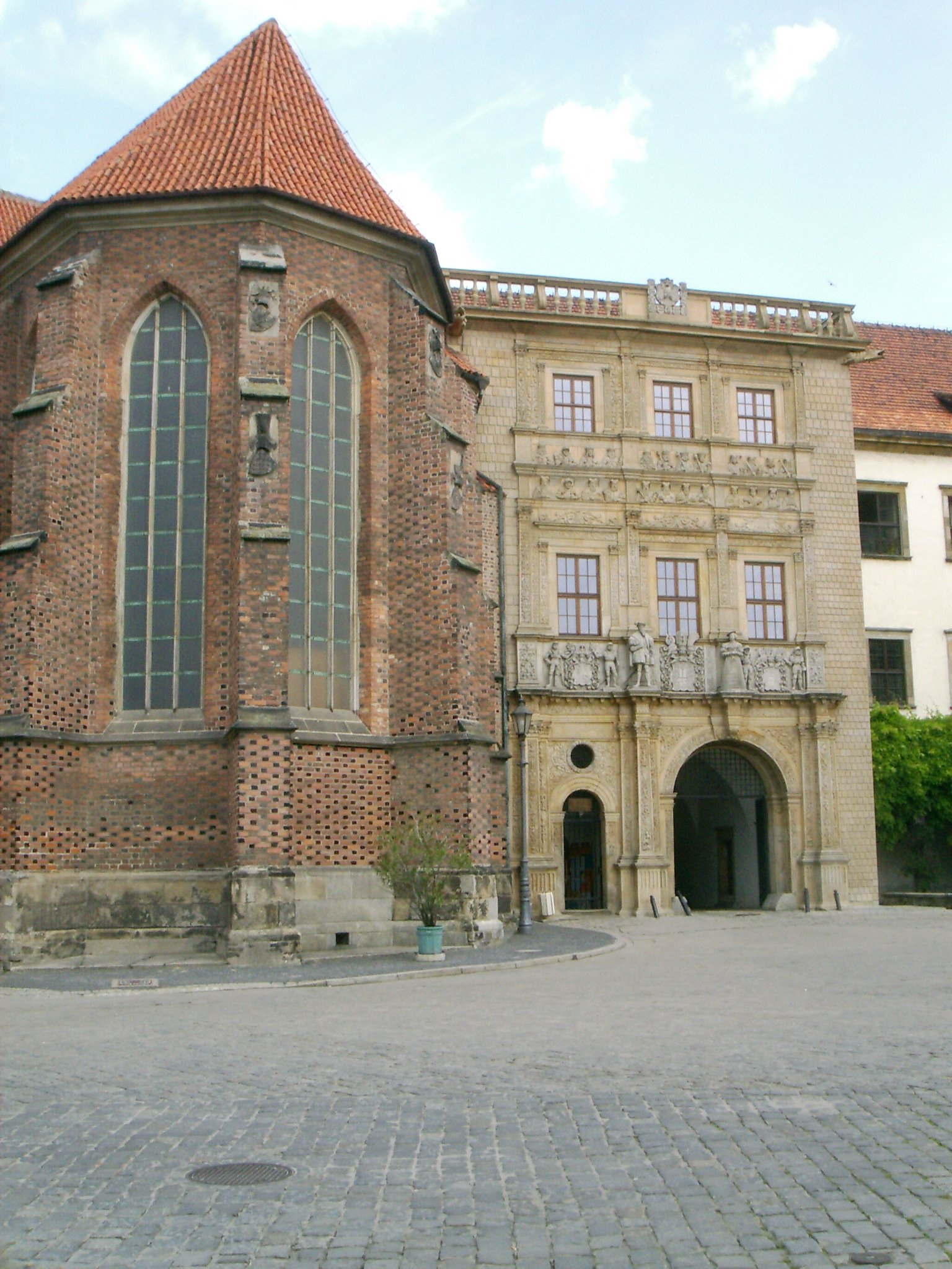 Brzeg